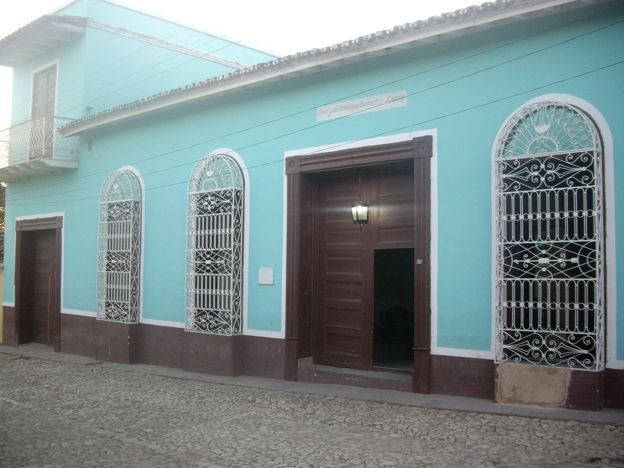 Casa Borrell a Trinidad, Cuba